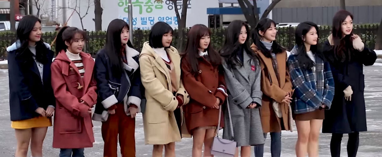 171222 프로미스_9(fromis_9) KBS 뮤직뱅크 출근길